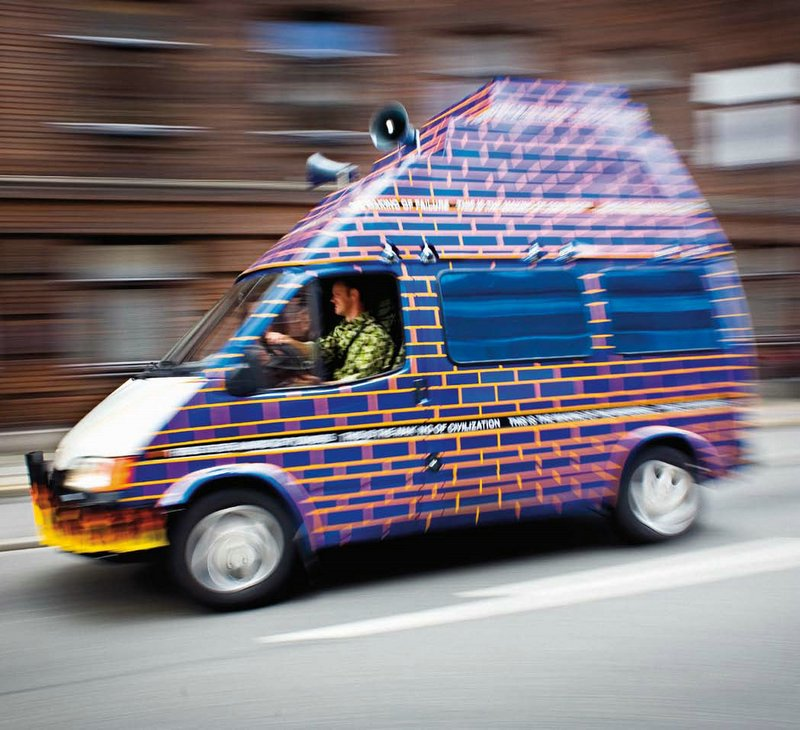 "Babylon Shuttlebus" af kunstnergruppen J&K til udstillingen "Sid Ned!" (2006) kurateret af Christian Skovbjerg Jensen. Foto: Kaare Smith